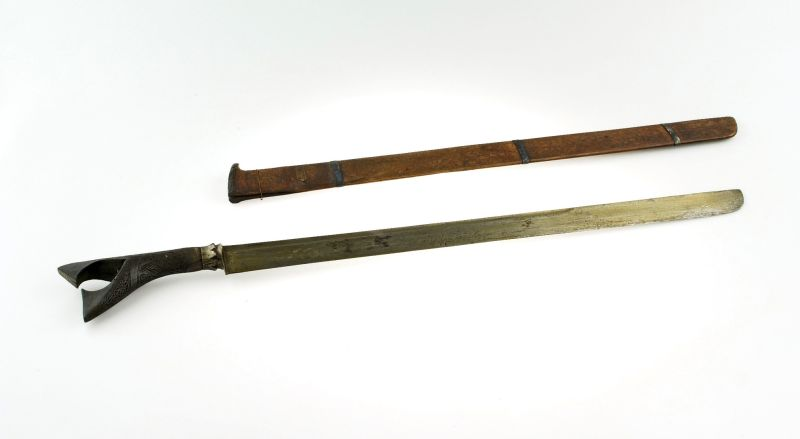 Zwaard. Zwaard met hoornen greep en houten schede